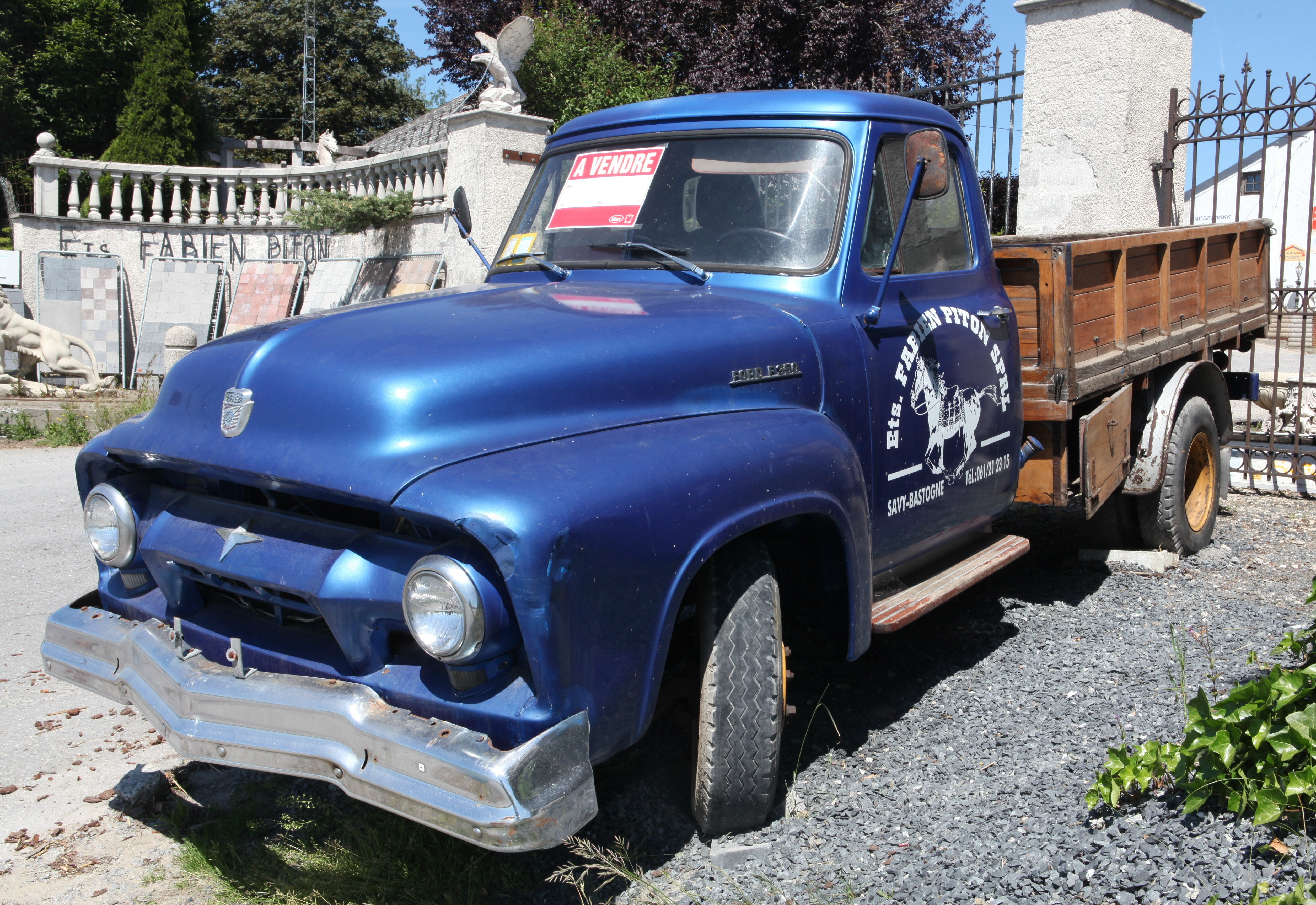 Ford F 350 (1951,52)